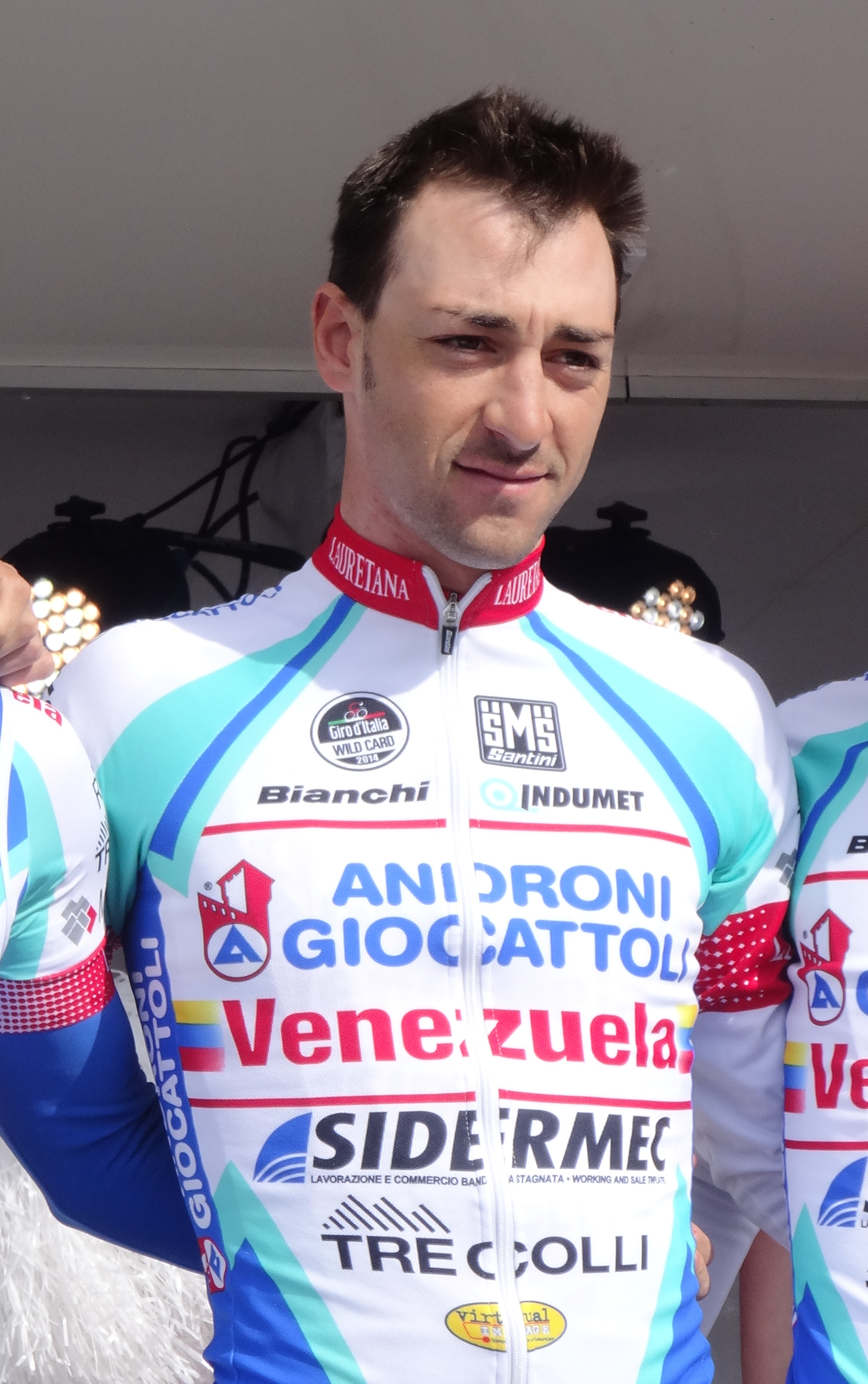 Reportage réalisé le jeudi 17 avril à l'occasion du départ et de l'arrivée du Grand Prix de Denain 2014 à Denain, Nord, Nord-Pas-de-Calais, France.